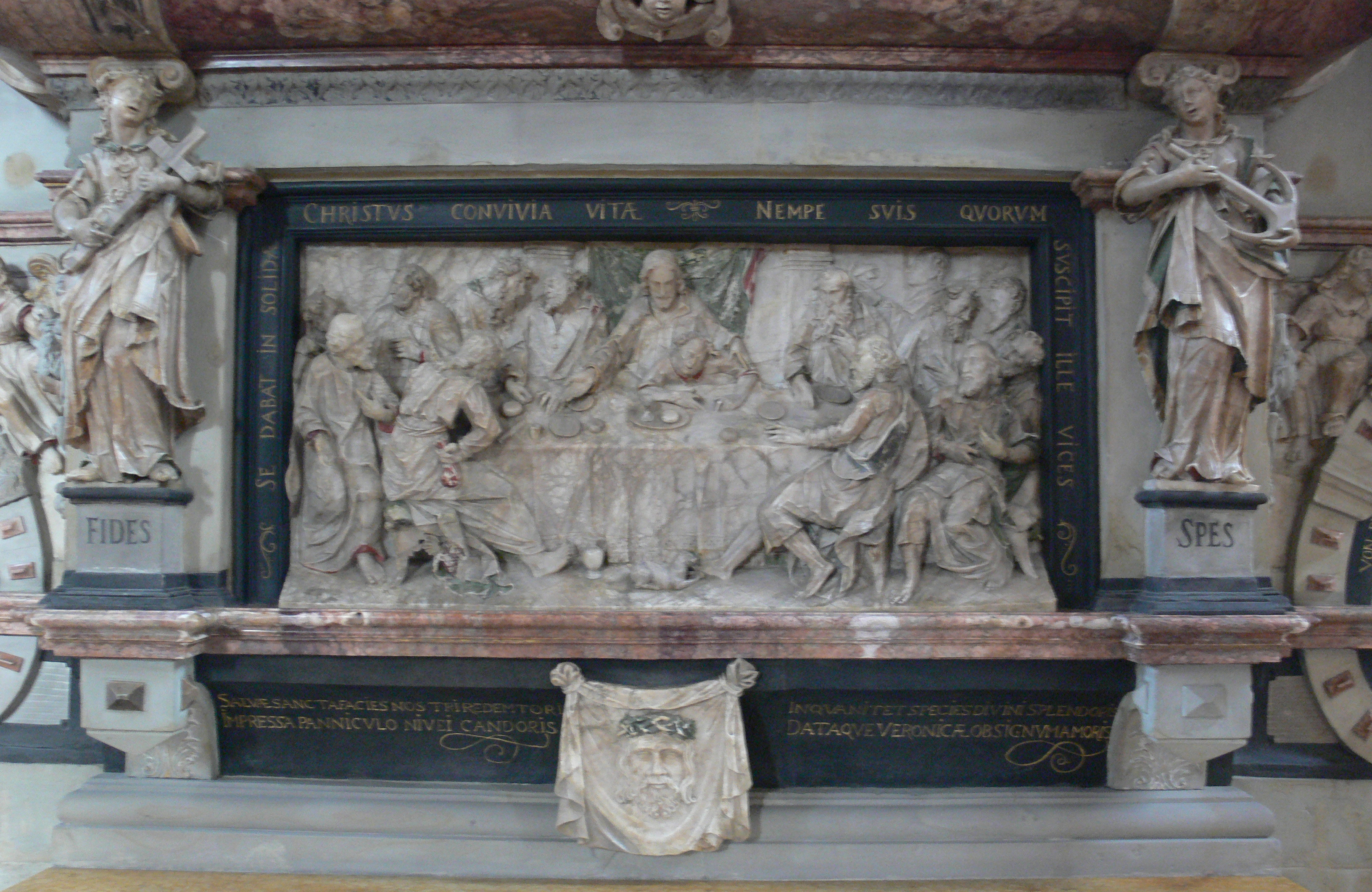 Trier, Dom, Grabaltar Lothar von Metternich, Detail: Fides und Spes, Abendmahlsszene, Schweisstuch der Veronika